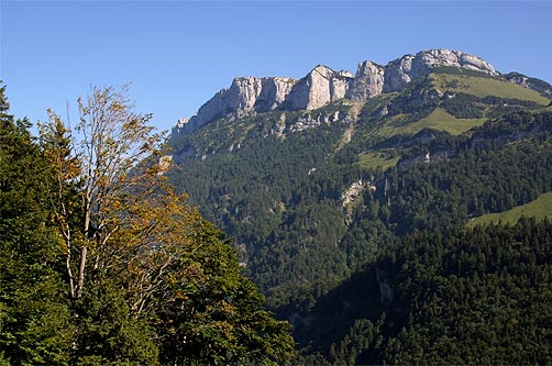 Berge (Zahme Gocht, Alp Sigel) über Wasserauen